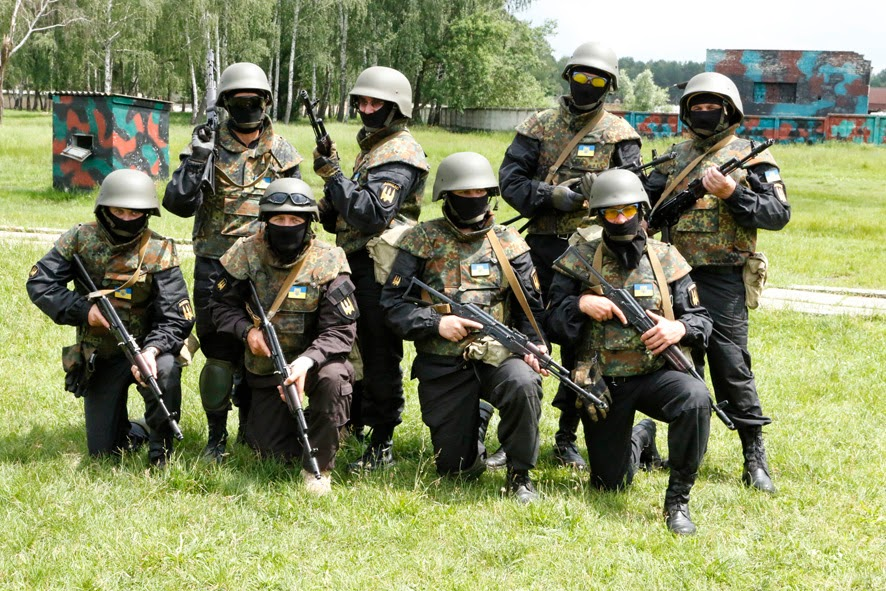 Відкрите тренування добровольців батальйону Донбас на тренувальній базі Нацгвардії України під Києвом.